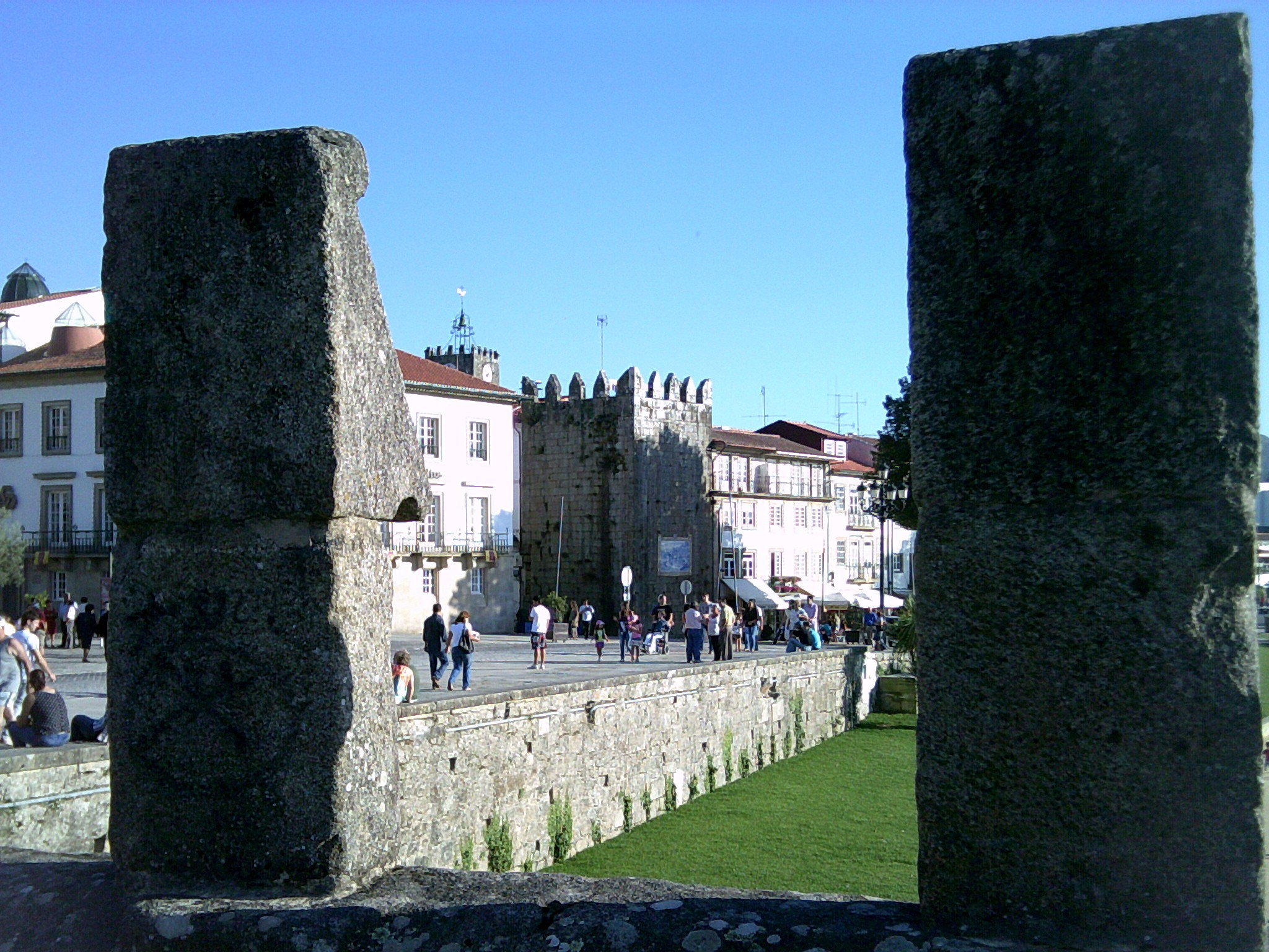 Torre de São Paulo, freguesia de Ponte de Lima, vila e concelho de mesmo nome, distrito de Viana do Castelo, Portugal: vista a partir da Ponte Velha.